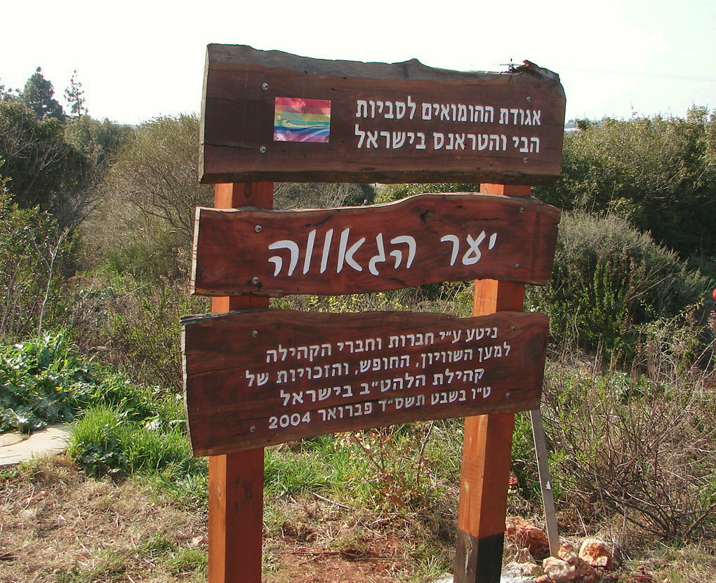 A sign at Ya'ar Haga'ava ("Pride Forest") in the Upper Galilee, dedicated to Israel's LGBT community .שלט ביער הגאווה של הקהילה הלהט"בית בגליל העליון.